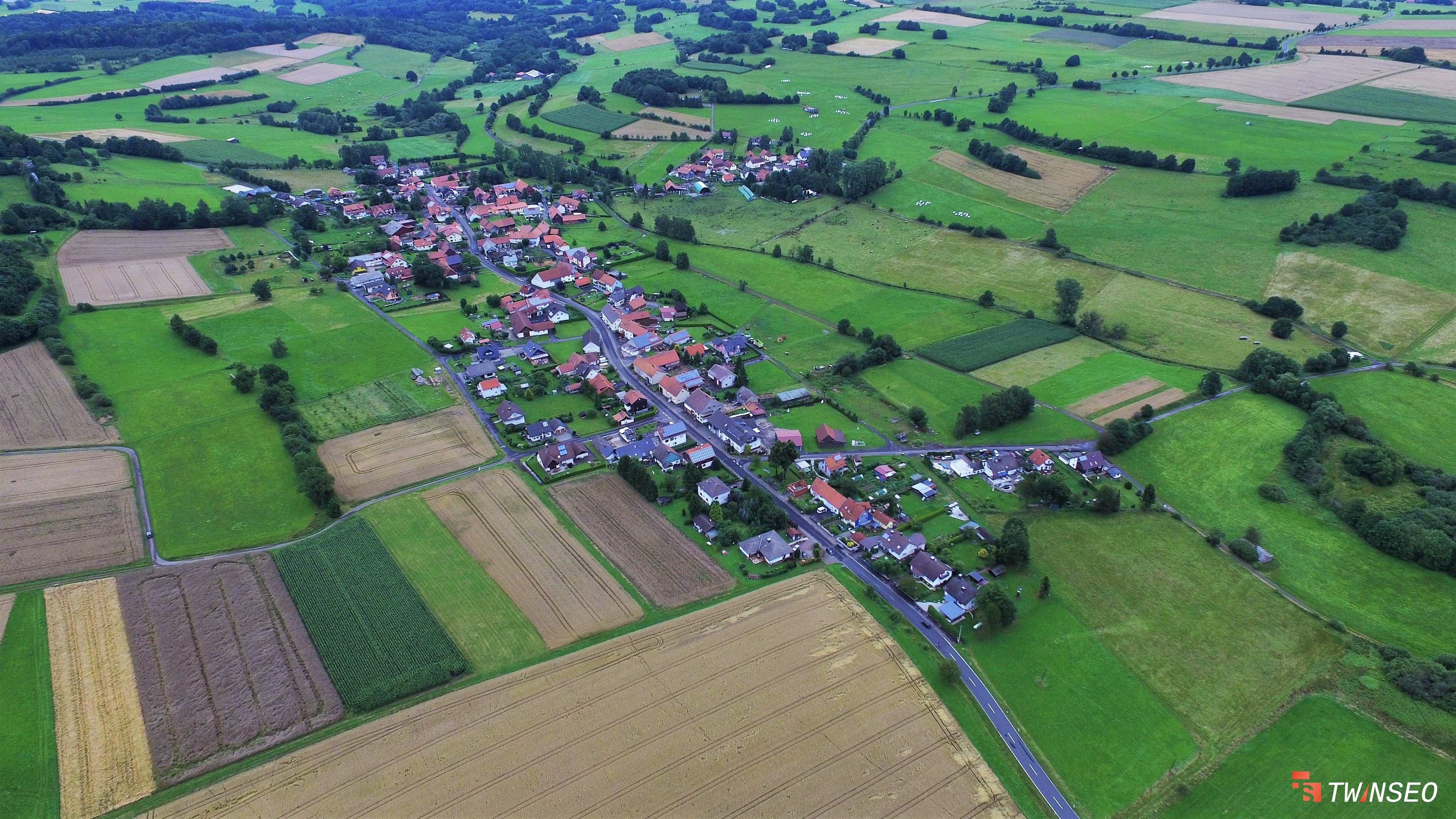 Luftaufnahme